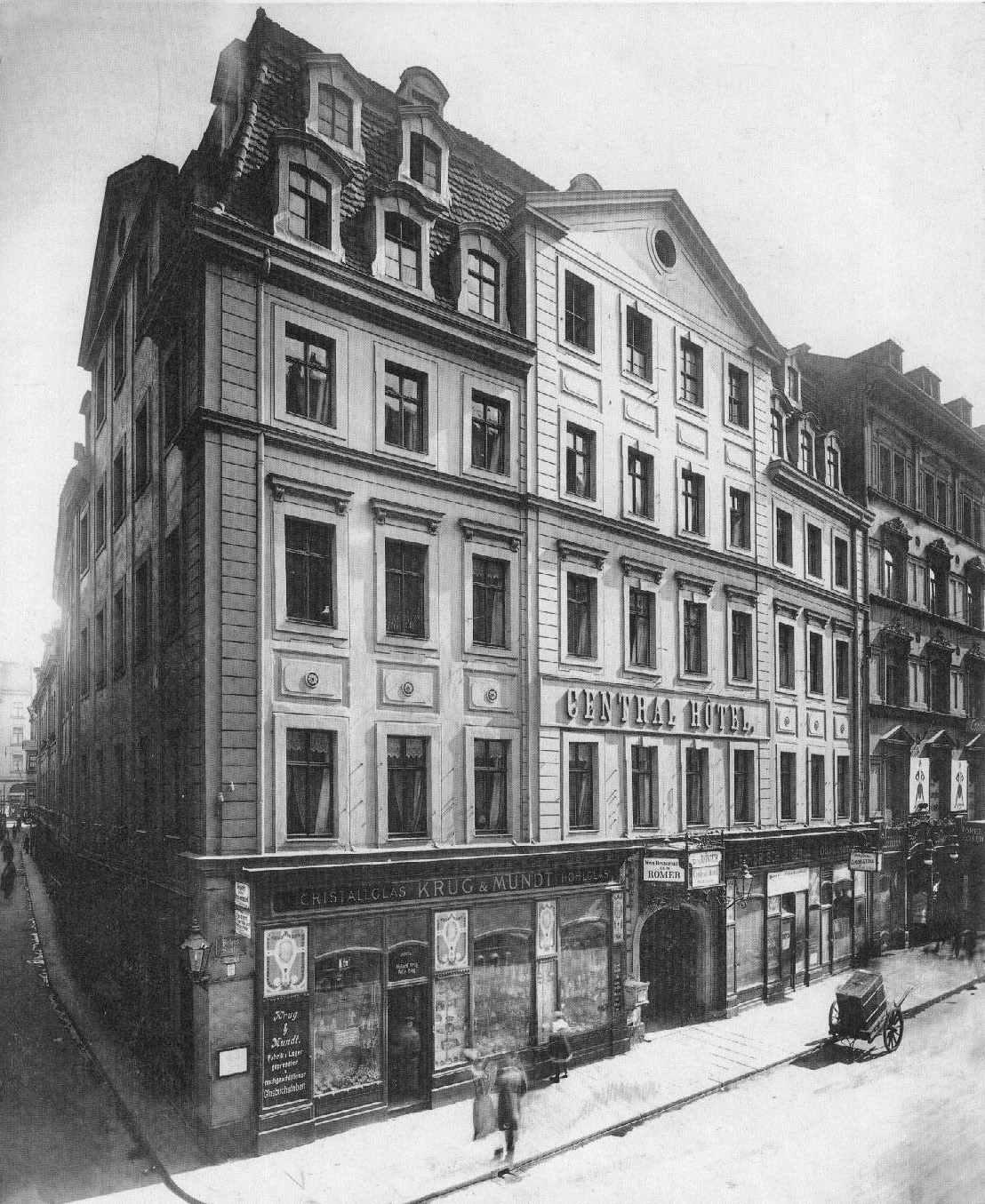 Petersstraße Nr. 25 / Preußergäßchen, Central Hotel mit 120 Zimmern. Bis 1887 unter den Namen Hotel de Baviére. An dieser Stelle wurde später 1912 das Kaufhaus Althoff (später Centrum-Warenhaus, heute (2013) Karstadt) erbaut.